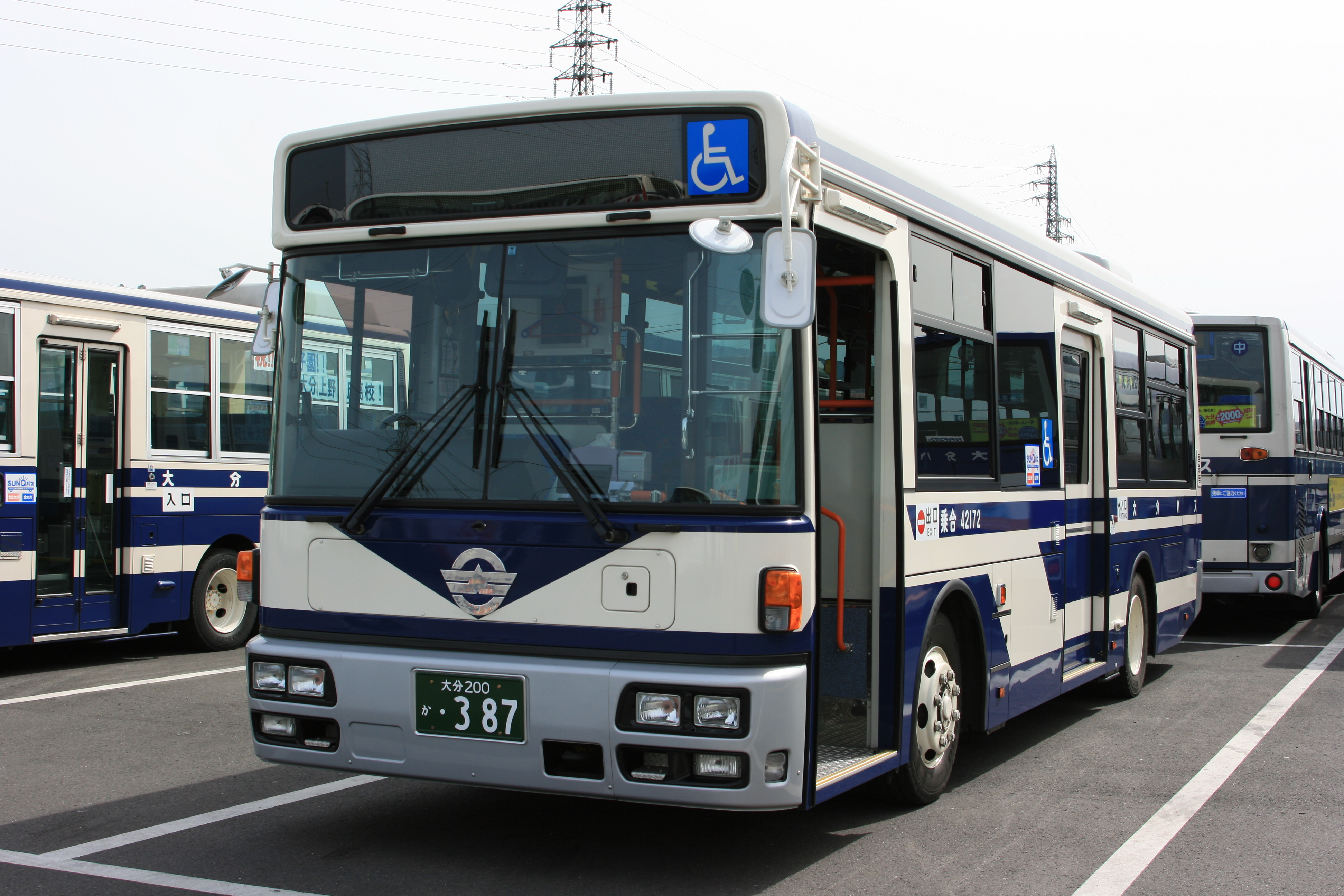 大分バス一般路線バス 三菱エアロミディS(PDG-AR820GAN) 大分バス中央営業所にて許可を得て撮影